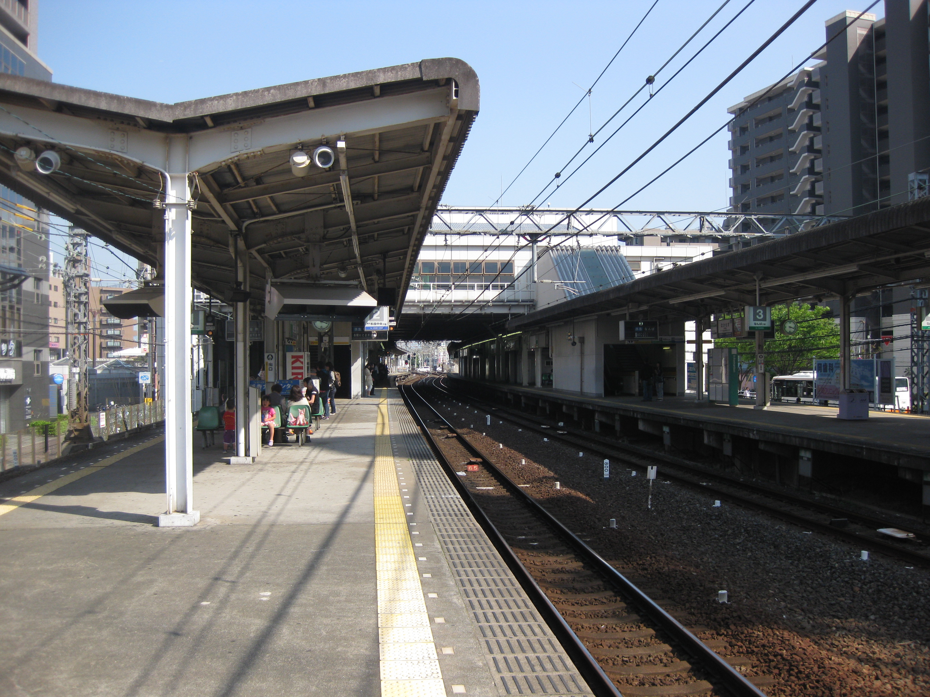 南海高野線中百舌鳥駅プラットホーム